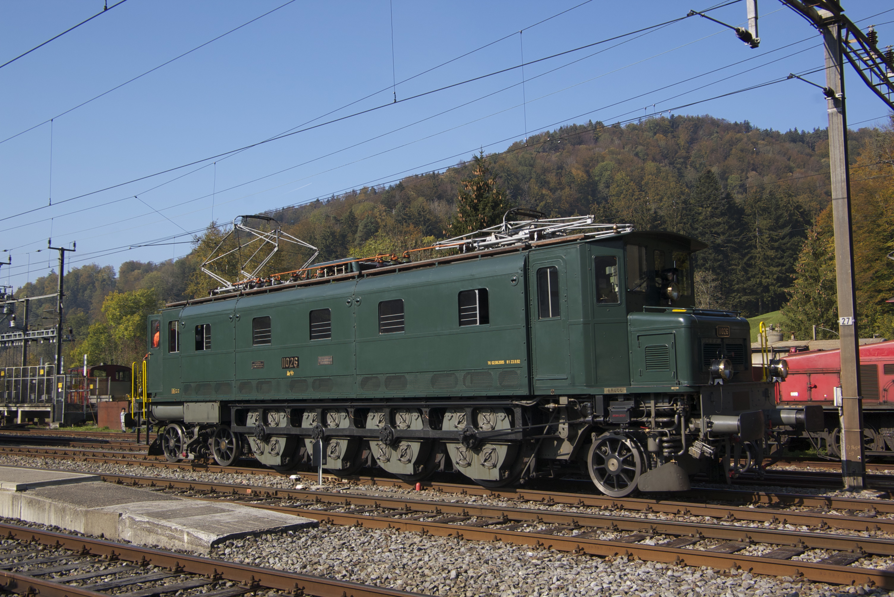 Locomotive Ae 4/7 11026 im Bahnhof Bauma.